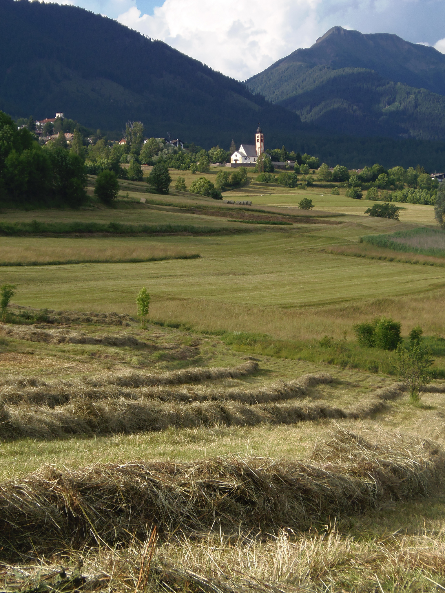 LA chiesa di Daiano da Carano in estate